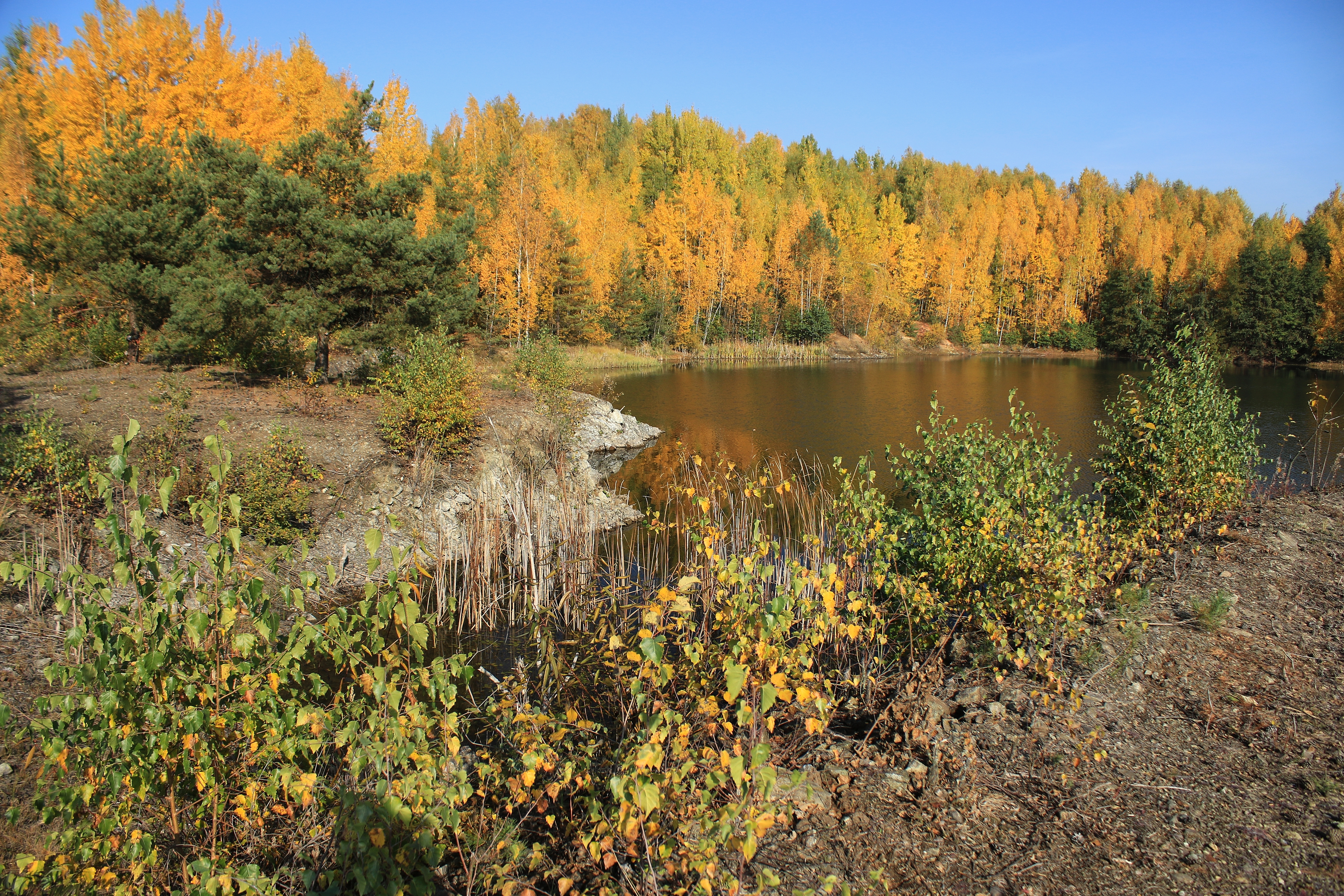 Naturschutzgebiet der ehemaligen Nickelgrube Callenberg Nord II in Sachsen; Kreis Zwickau.